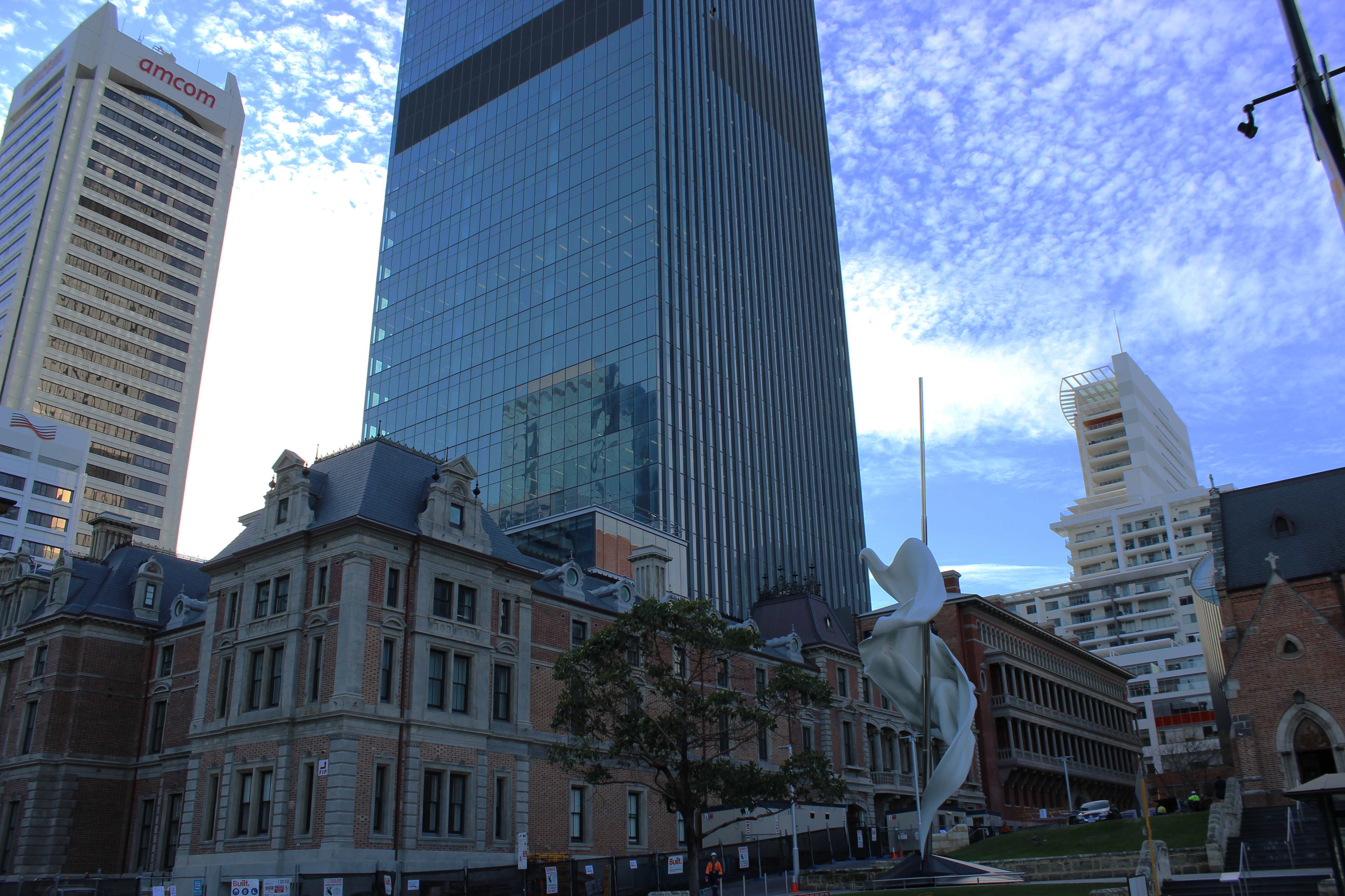 Sights from the CBD